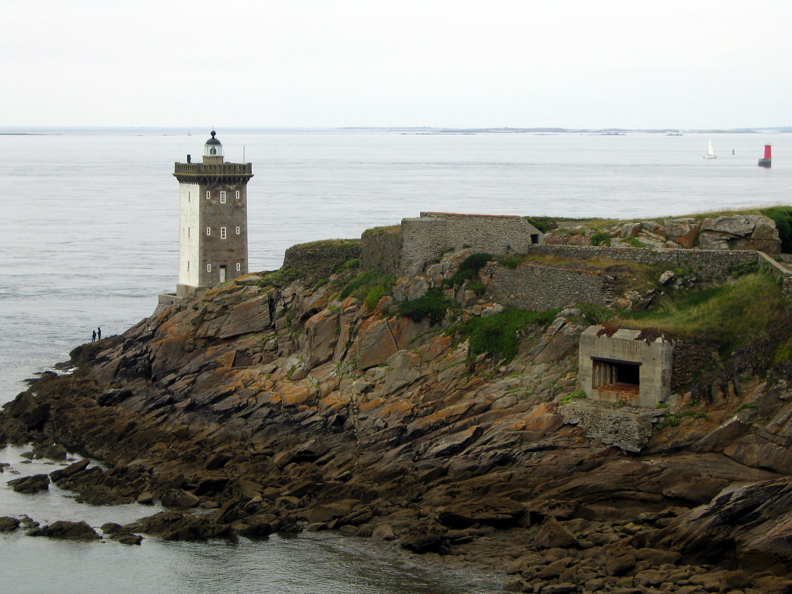 Vue du phare de Kermorvan